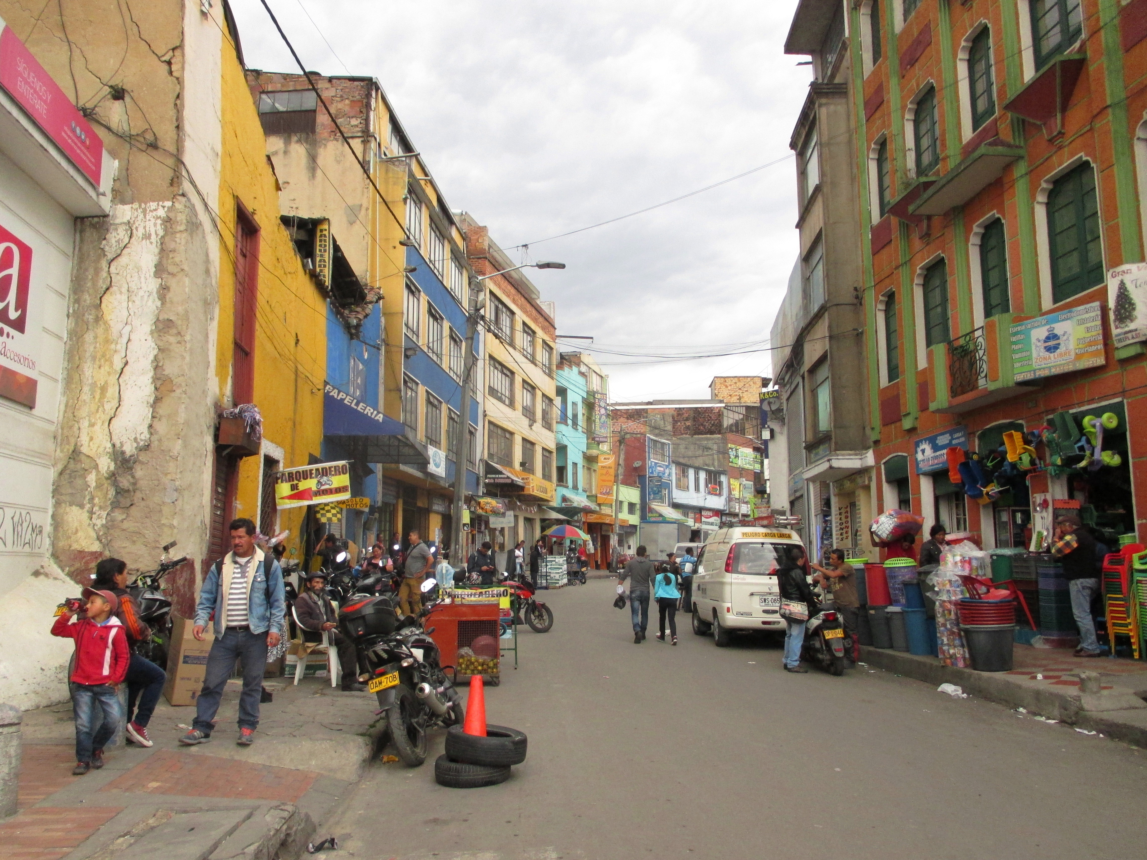 Bogotá, edificios en el sur de la zona comercial de San Victorino. Carrera 12 entre calles 9 y 10, centro de Bogotá. Antiguo cauce del río San Francisco.